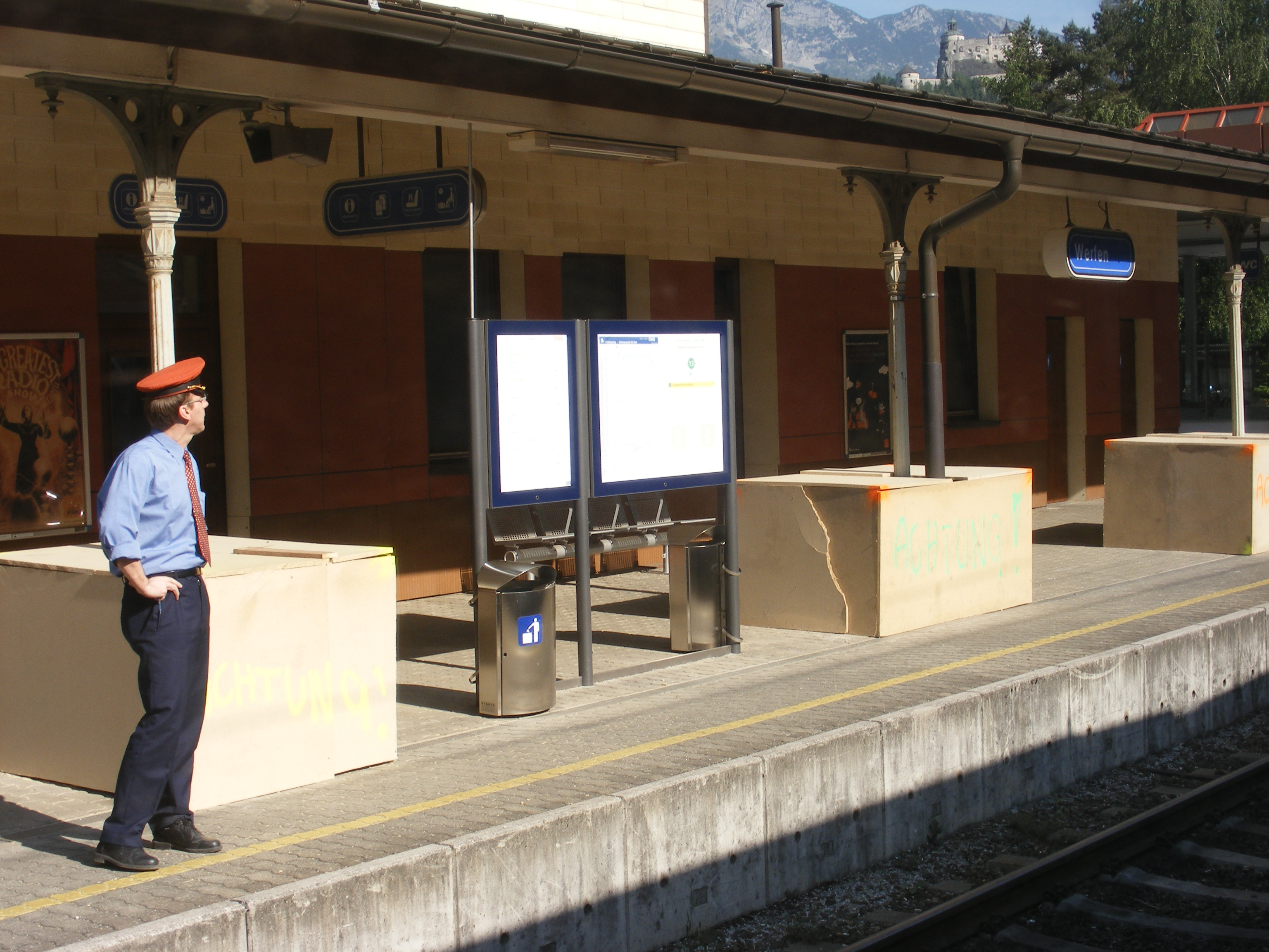 Fahrdienstleiter im Land-Salzburger Bahnhof Werfen (Bezirk St. Johann im Pongau)